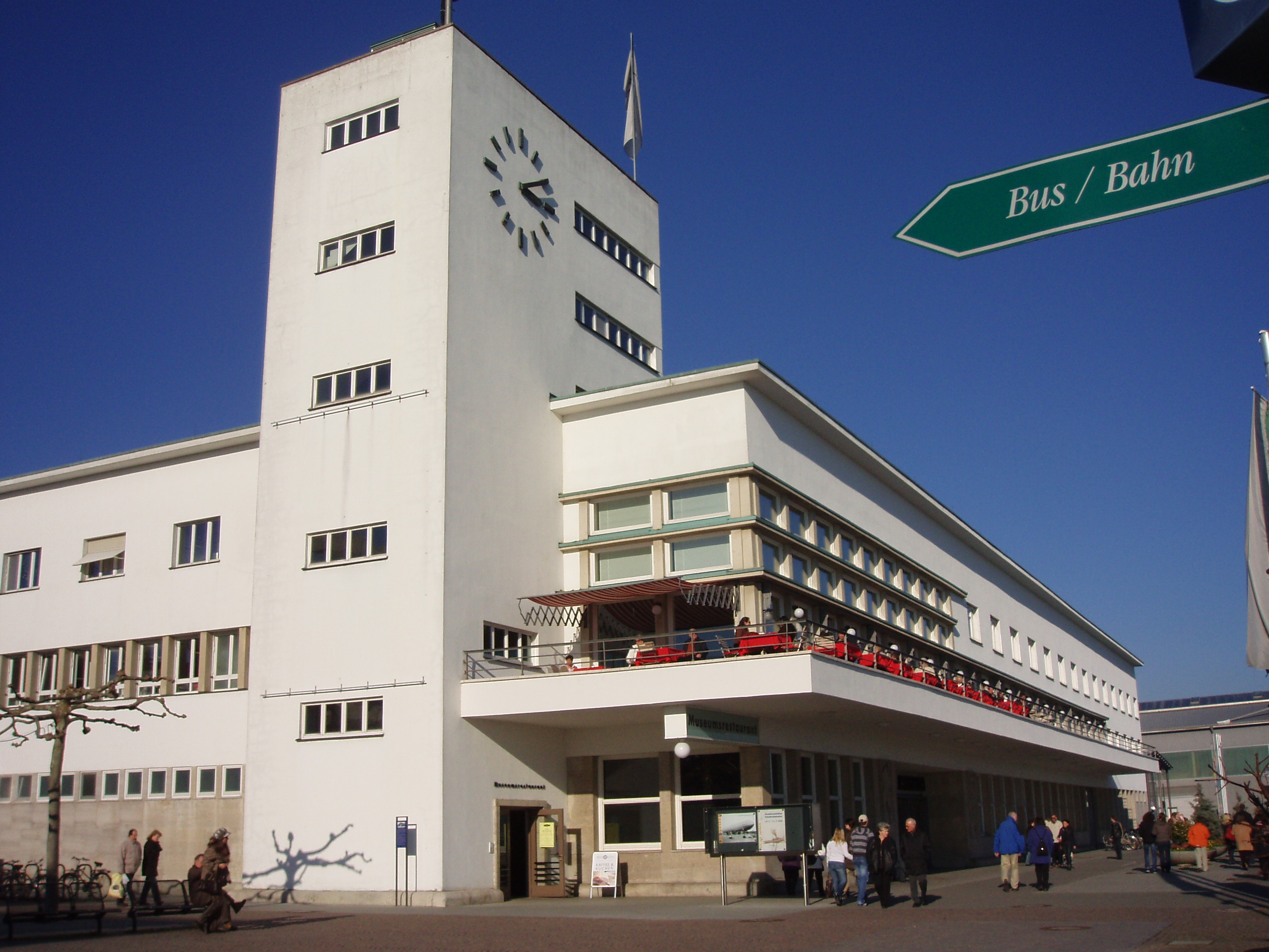 Zeppelinmuseum Friedrichshafen